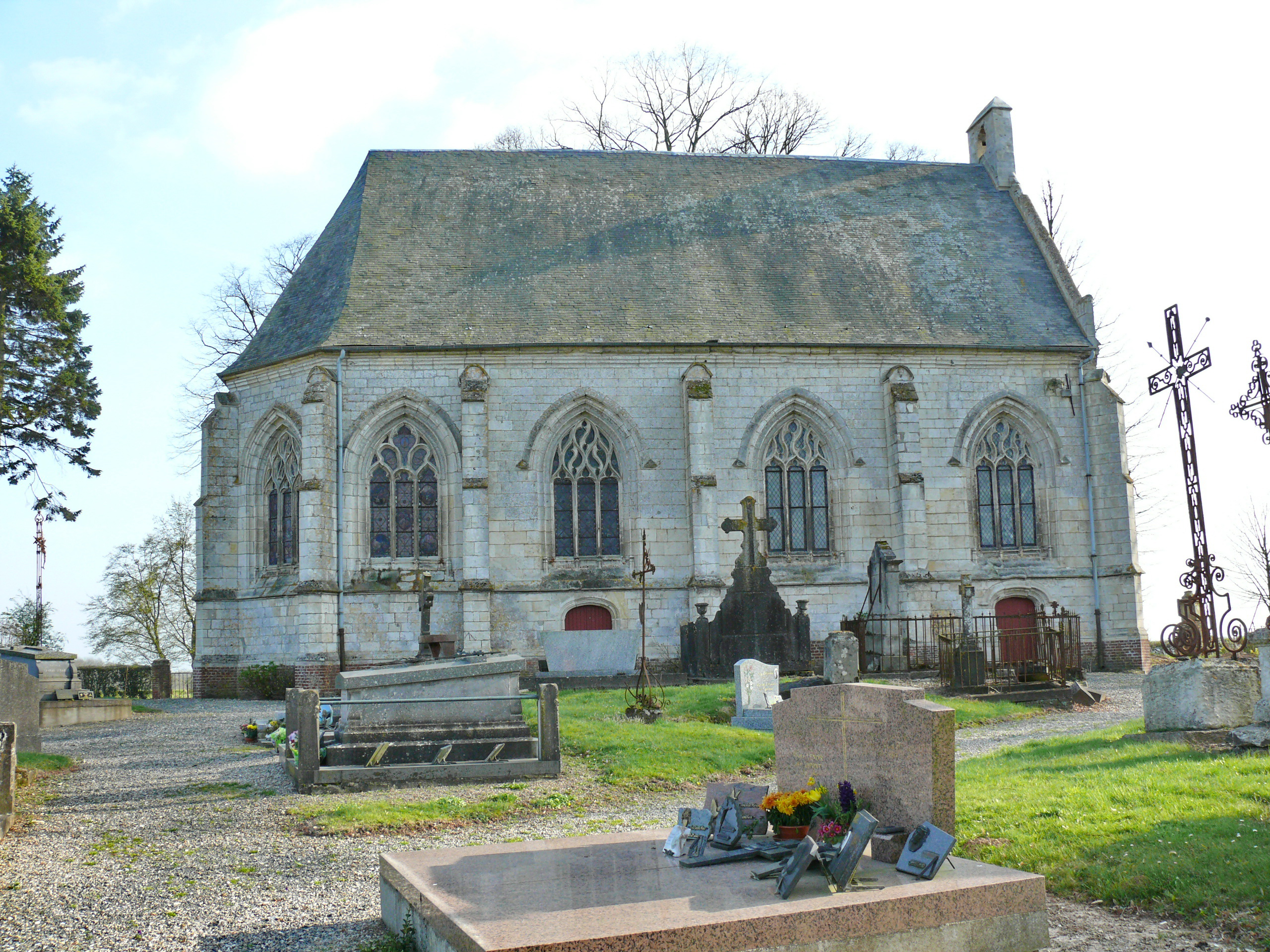 Sentelie - Chapelle Saint-Lambert